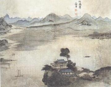 겸재 정선의 압구정도